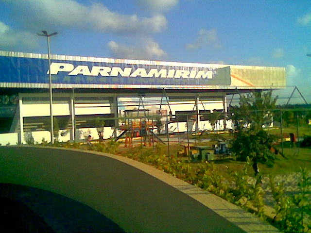 Ginásio da Cohabinal - Parnamirim - RN.